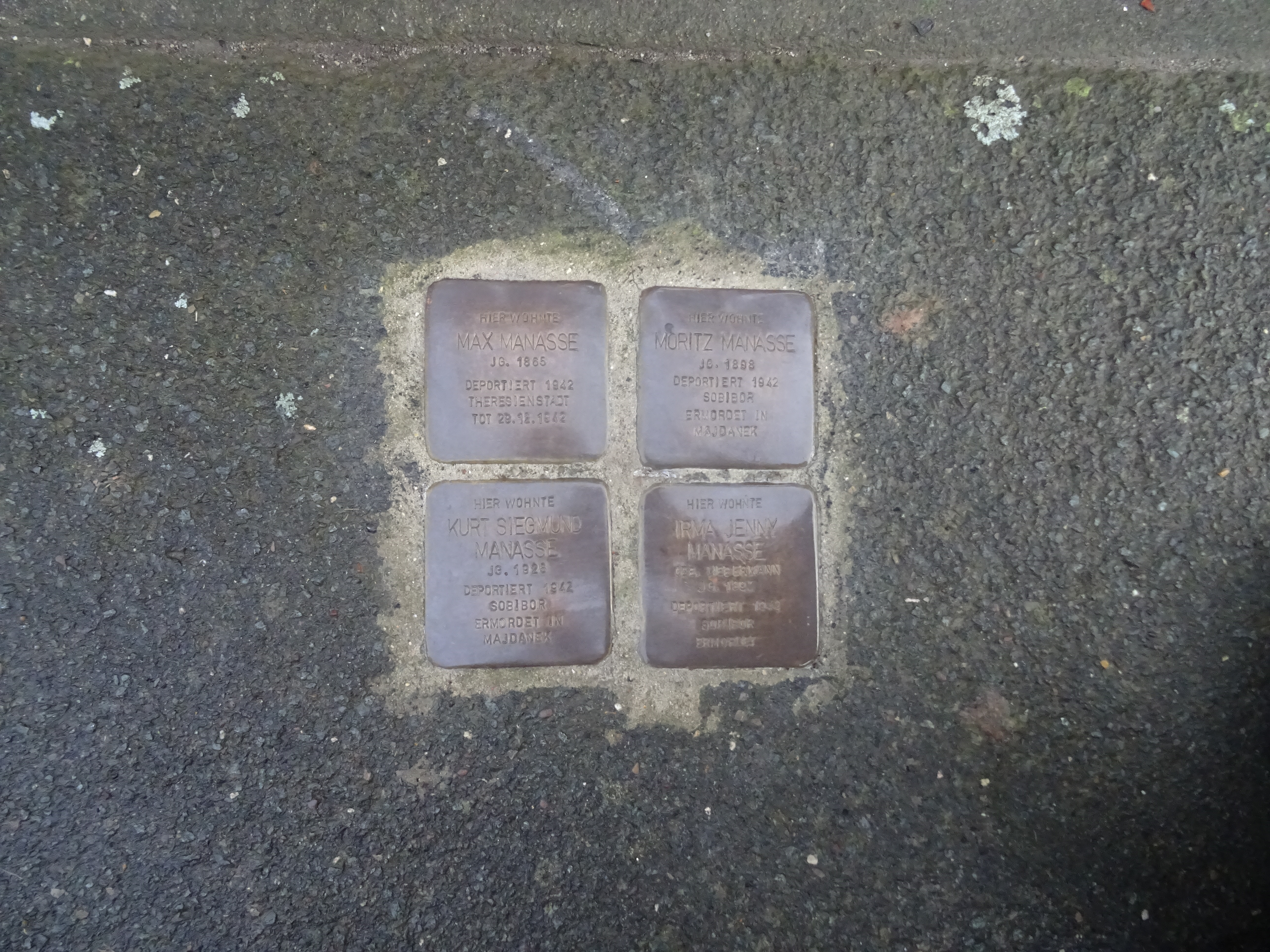 Stolpersteine Biskirchen Weilburger Straße 9